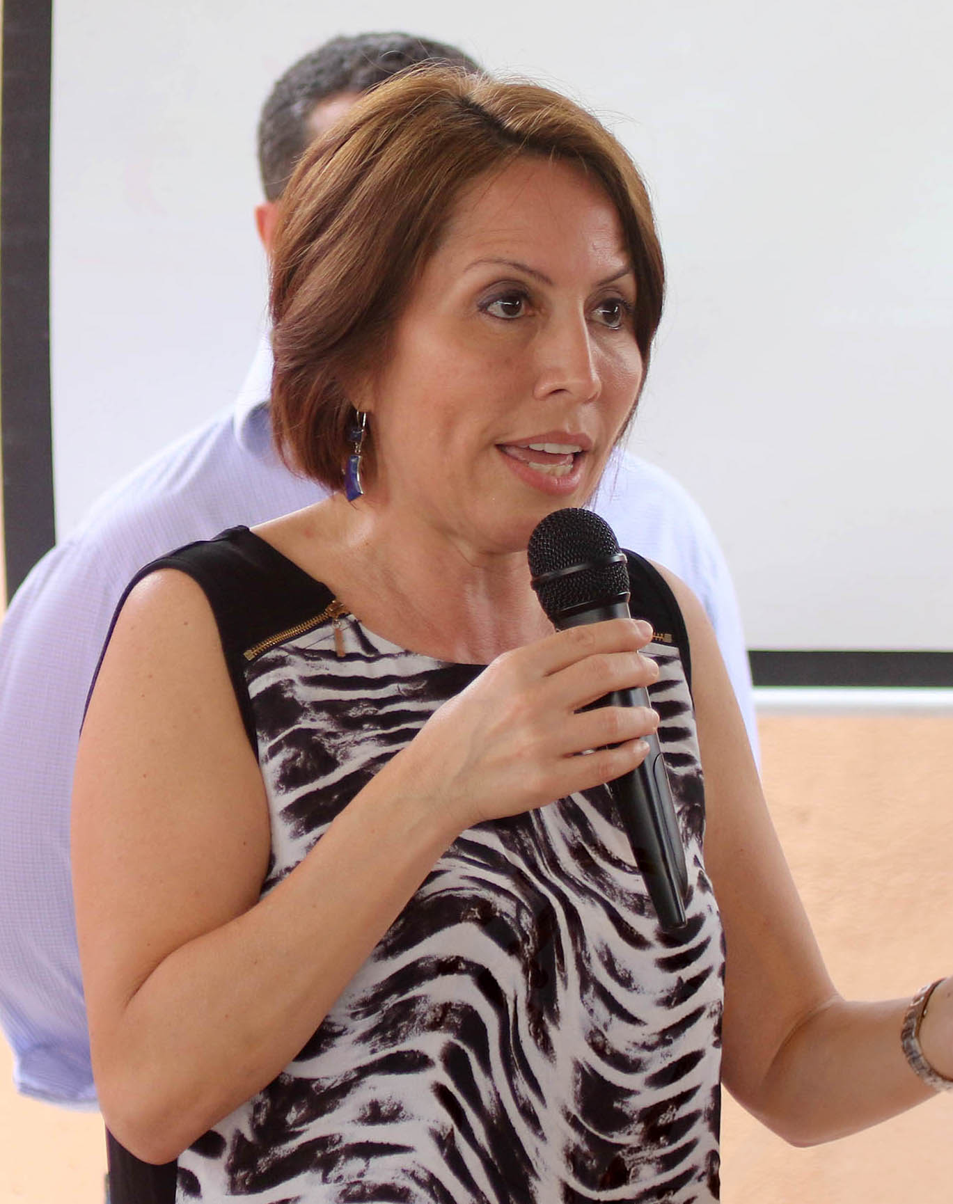 Guayaquil, 06 de nov. del 2015 (Andes).-En la urbanización Ciudad Santiago, al norte de Guayaquil, María de los Angeles Duarte, titular del Ministerio de Desarrollo Urbano y Vivienda (MIDUVI), realizó la entrega de bonos de adquisición de vivienda.Foto:César Muñoz/Andes